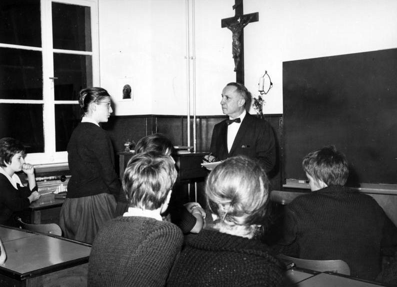 Klosterschule Nonnenwerth am Rhein